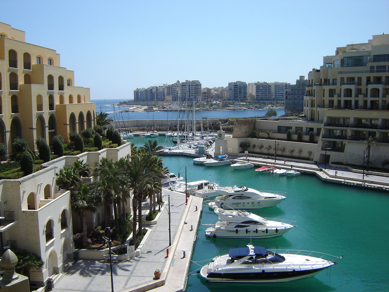 Boote und marine Anlagen. Malta, April 2006. Urlaubseigenheimanlage mit Bootsanleger